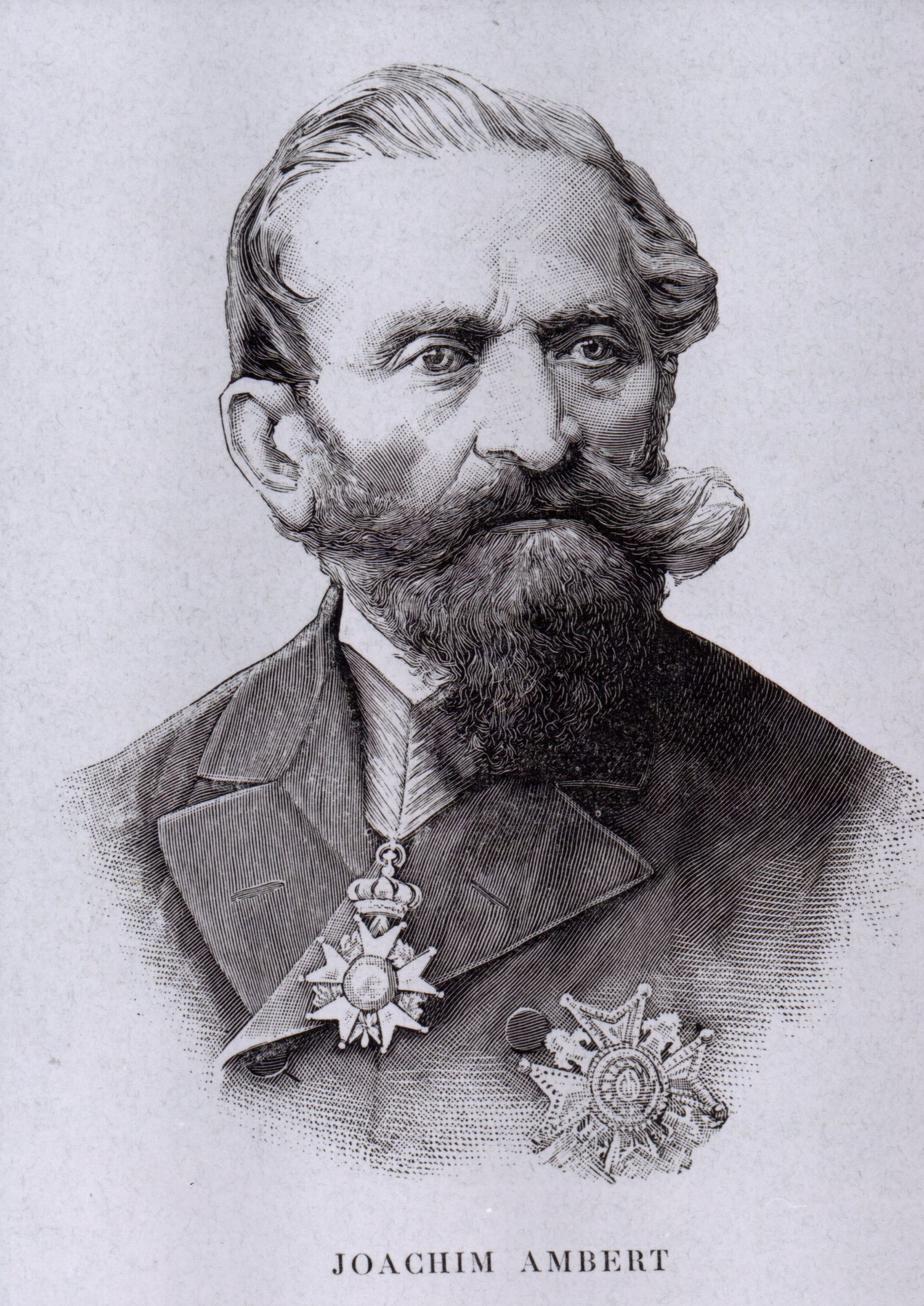 portrait du Général Joachim Ambert (vers1880)